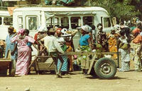 Taxi-brousse à Boundiali, en Cote d'Ivoire